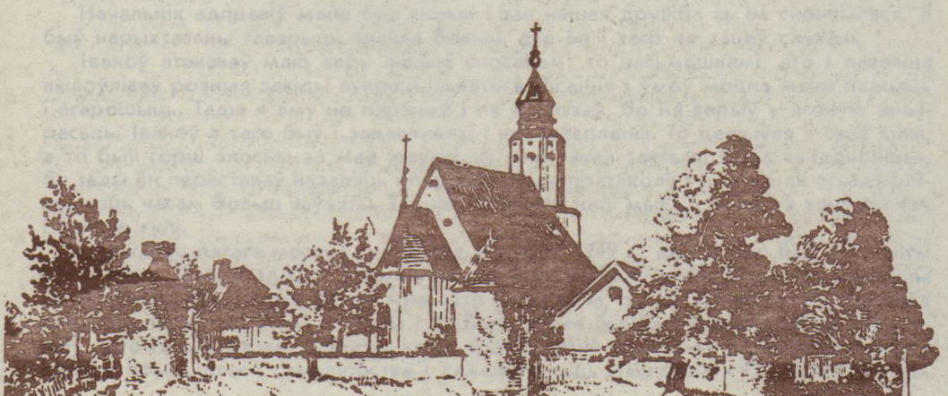 Беларуская (тарашкевіца): Агульны выгляд збора з тылу. Мал. пачатку XX ст.